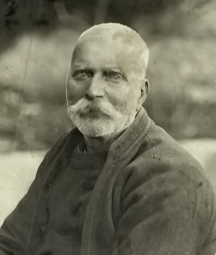 Stambol Dimitrov Valkov Portret 1930'